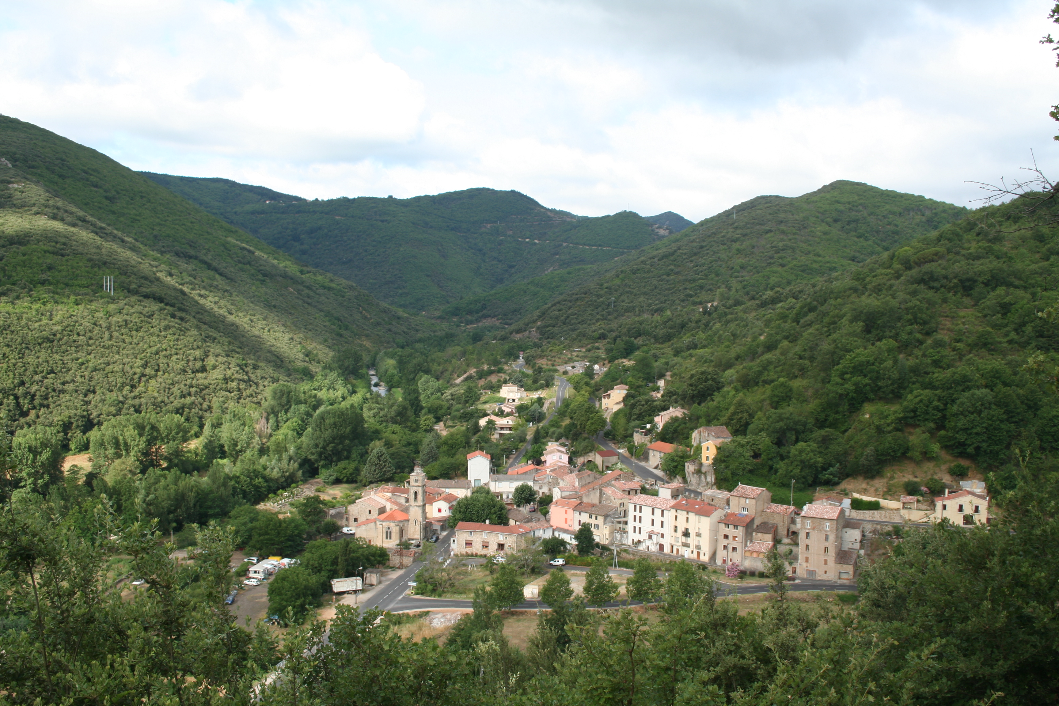 Saint-Étienne-Estréchoux (Hérault) - vue générale.